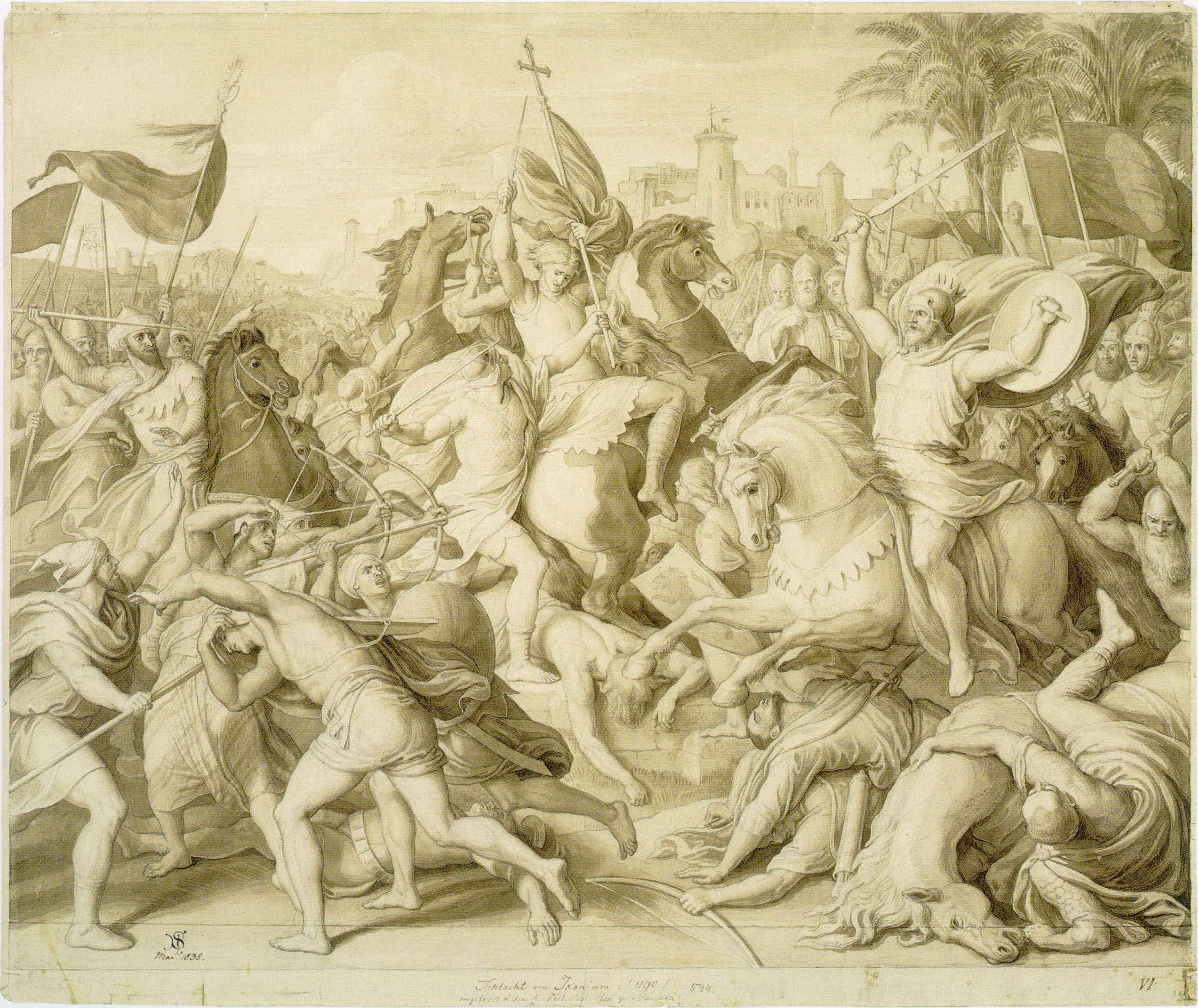 Die Schlacht von Iconium 1190, 1835